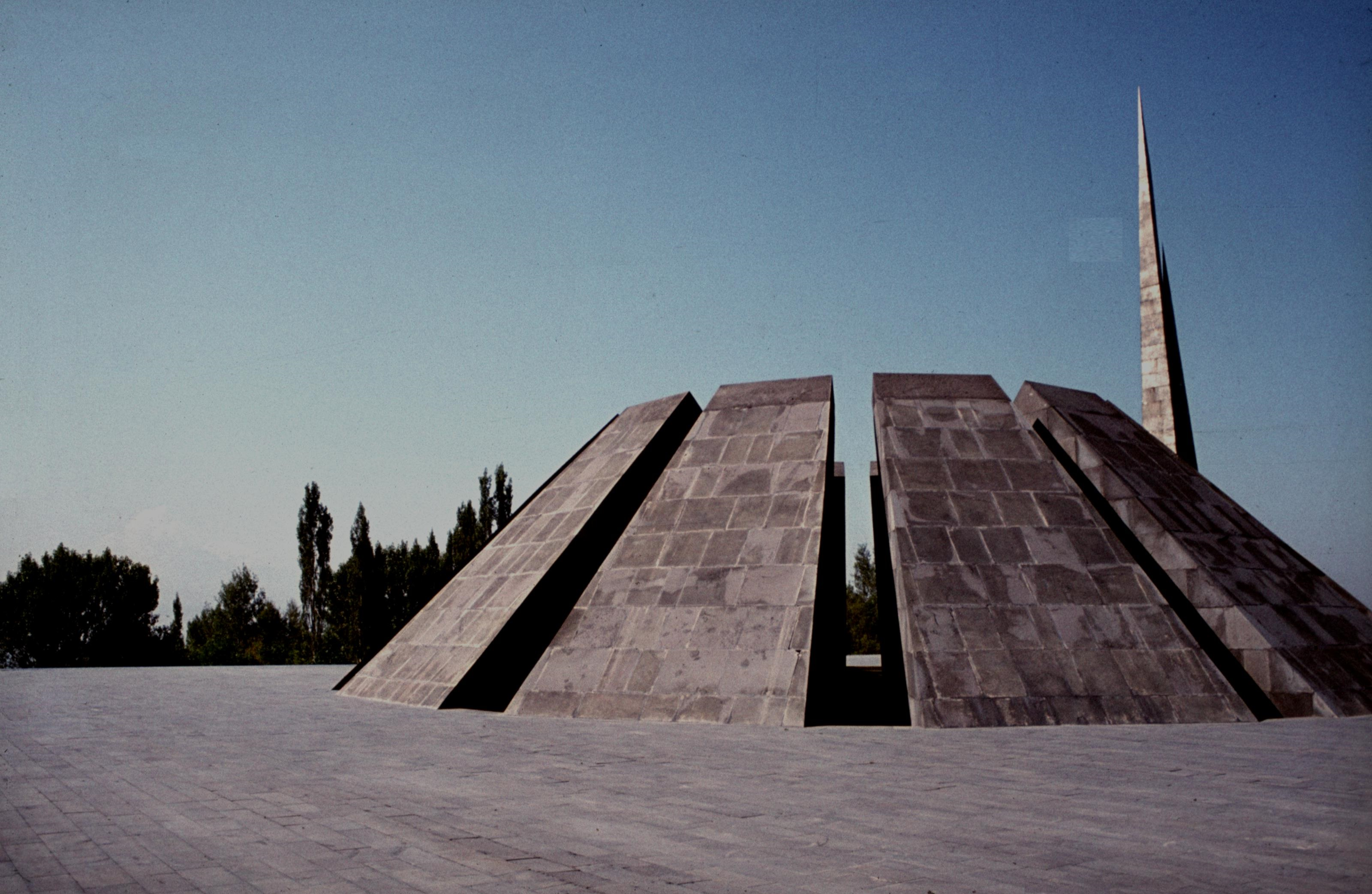 Zizernakaberd, Eriwan, 1982